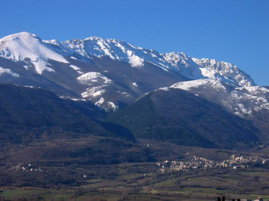 Sirente